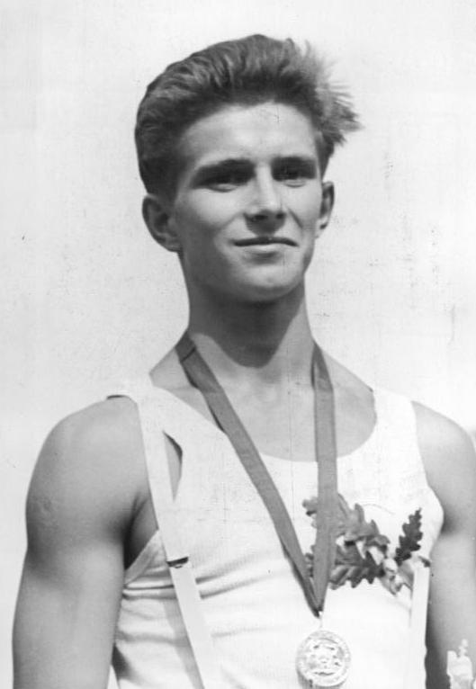 Leipzig, Turn- und Sporttreffen, Siegerehrung Zentralbild Schlegel Son-Noa 21.7.1957 Turn- und Sporttreffen der Jugend in Leipzig. Höhepunkt des Turn- und Sporttreffens der Jugend in Leipzig war die Siegerehrung der jungen Sportlerinnen und Sportler. Karl Namokel sprach zu der Jugend im Zentralstadion. UBz: Der Turner Siegfried Tüller.